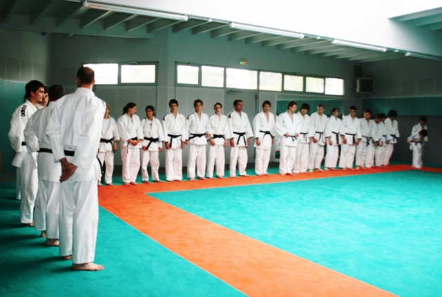 Français